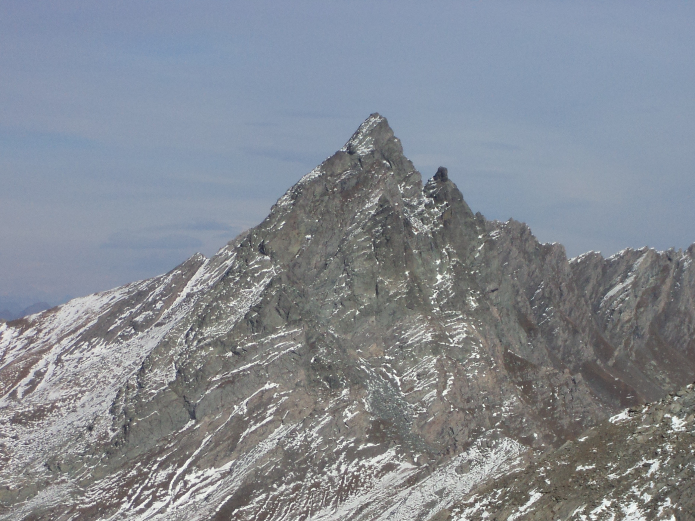 Bric Bucie (versante sud), Cottian Alps